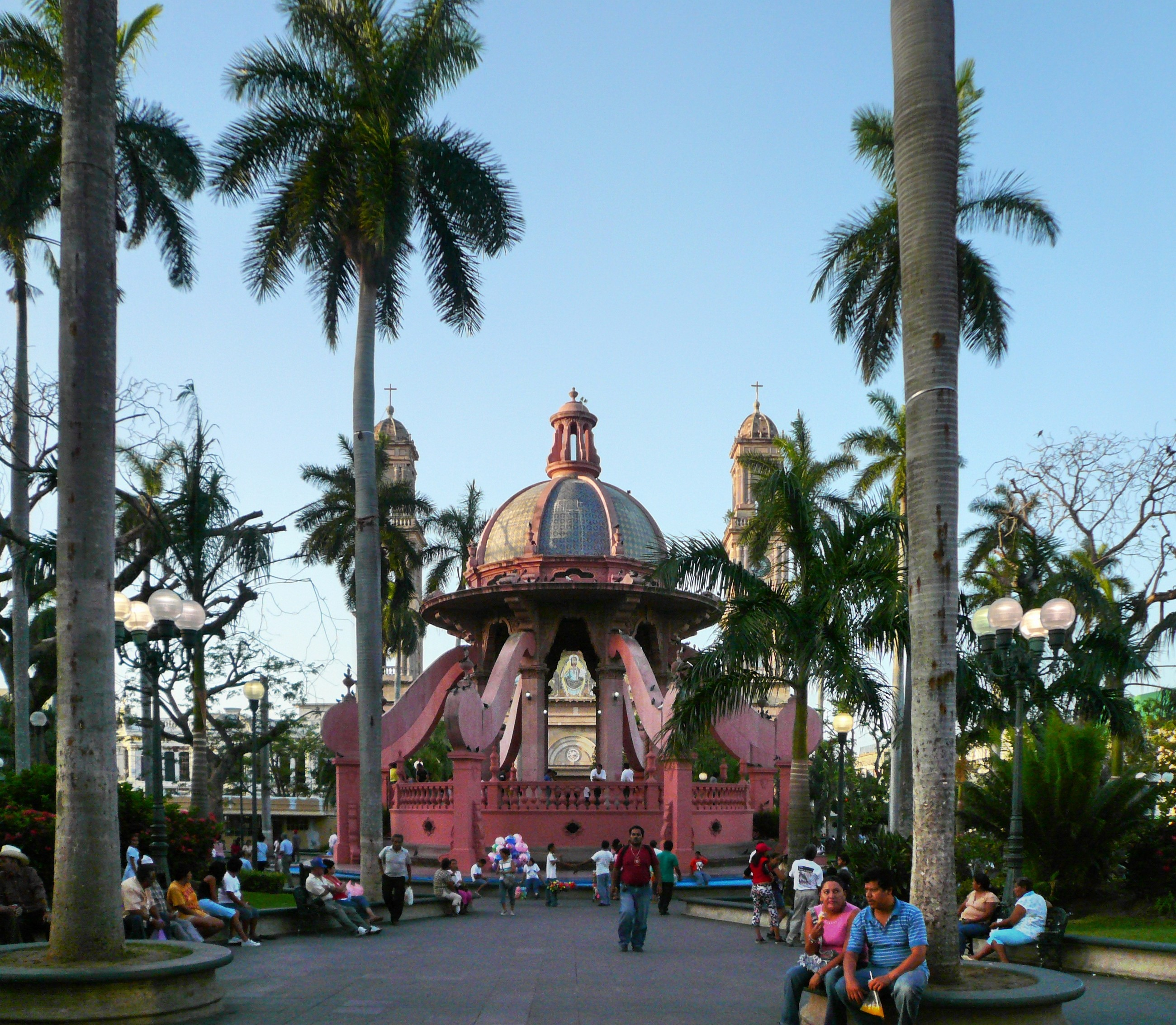 Tampico main centre plaza.